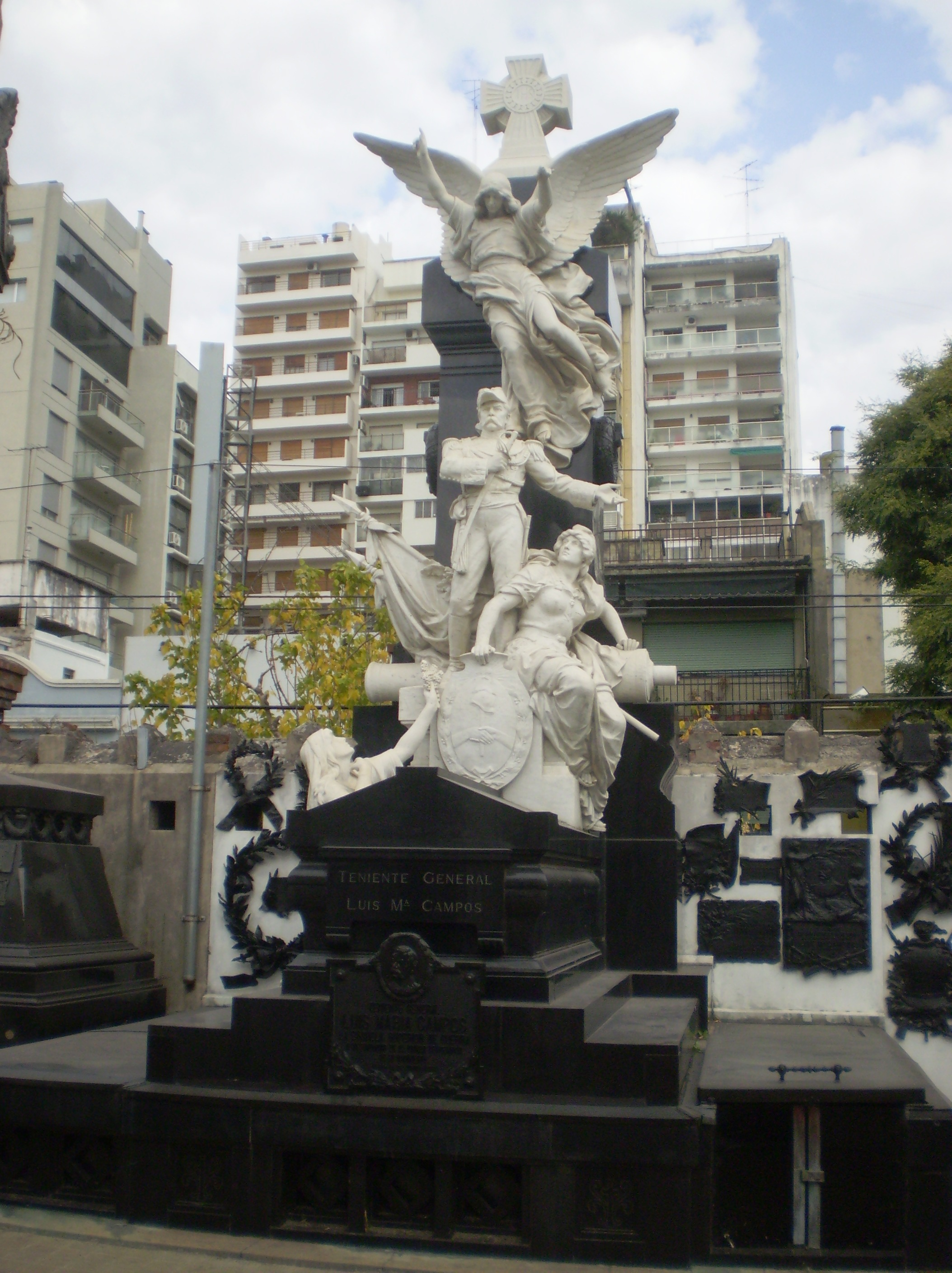 Monumento fúnebre de Luis M. Campos, Cementerio de la Recoleta, Buenos Aires.